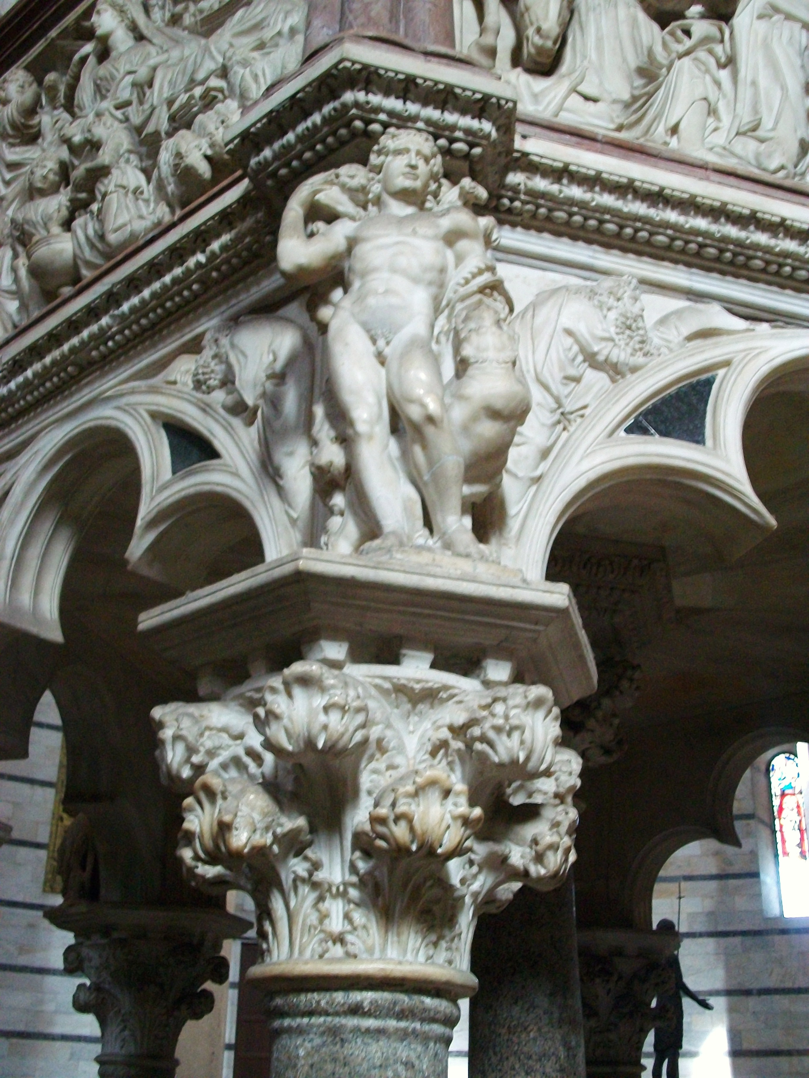 Detall del púlpit del baptisteri de Pisa, Nicola Pisano.